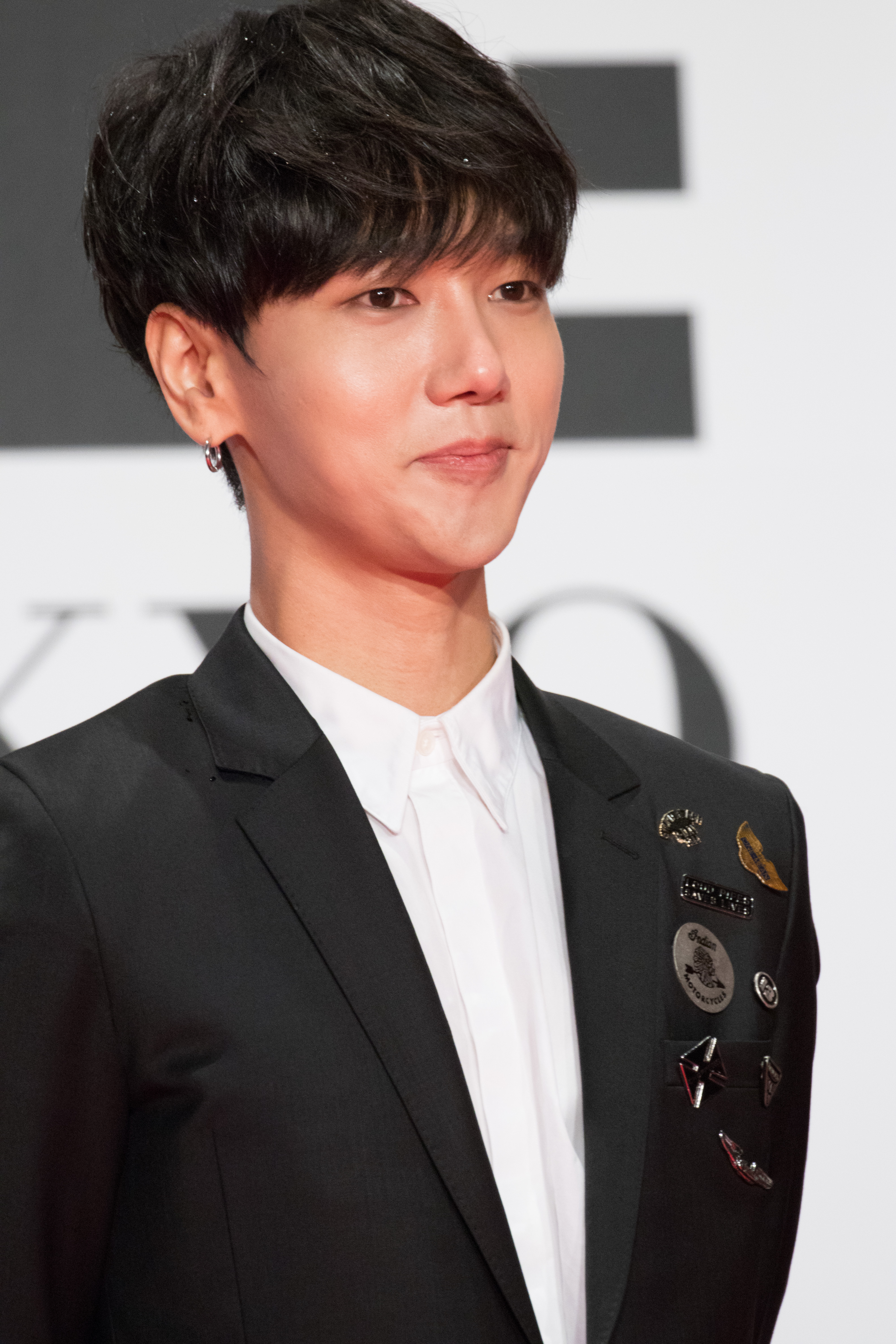 第29回 東京国際映画祭 オープニングセレモニー イェソン (いきなり先生になったボクが彼女に恋をした)